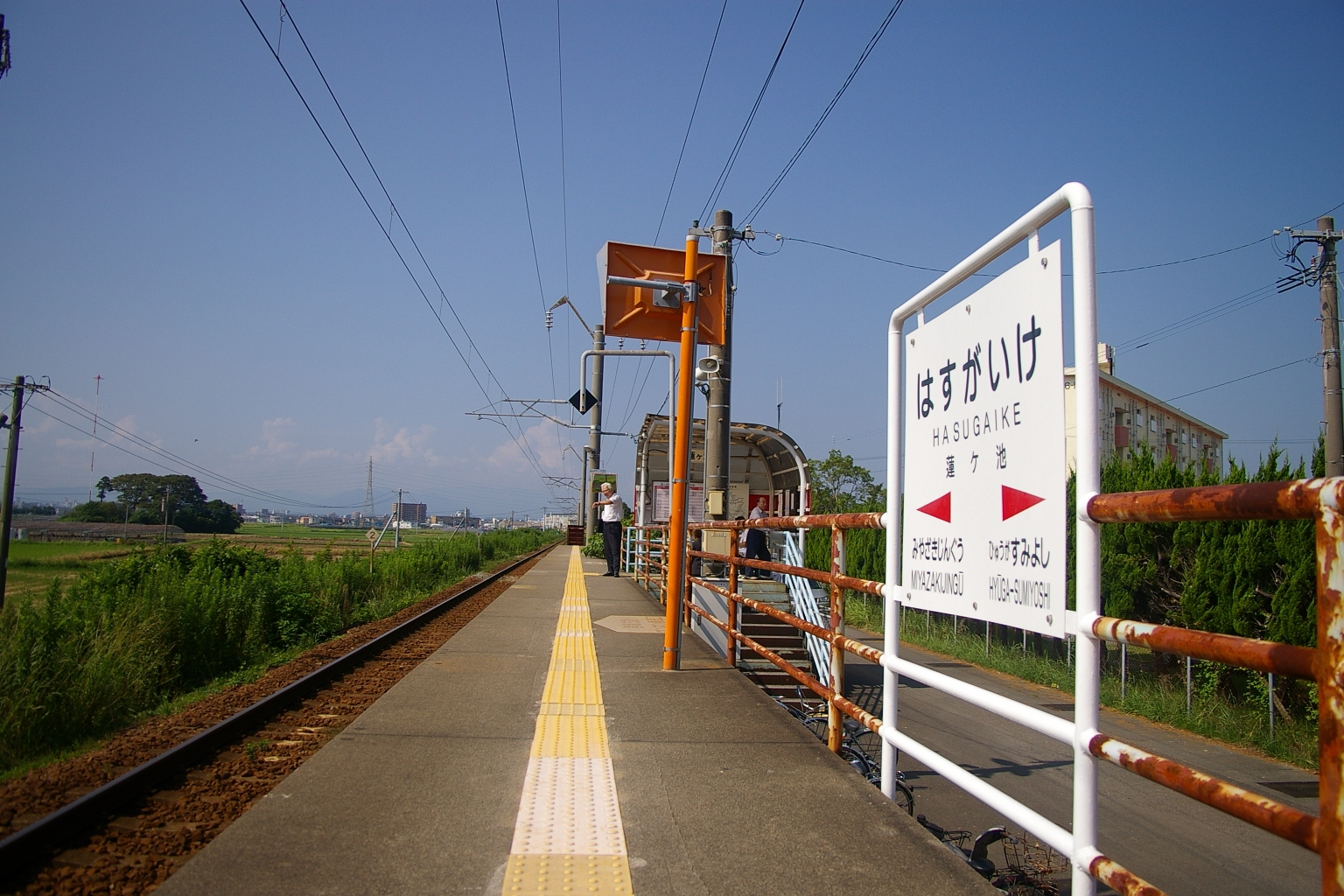 撮影：takasunrise0921